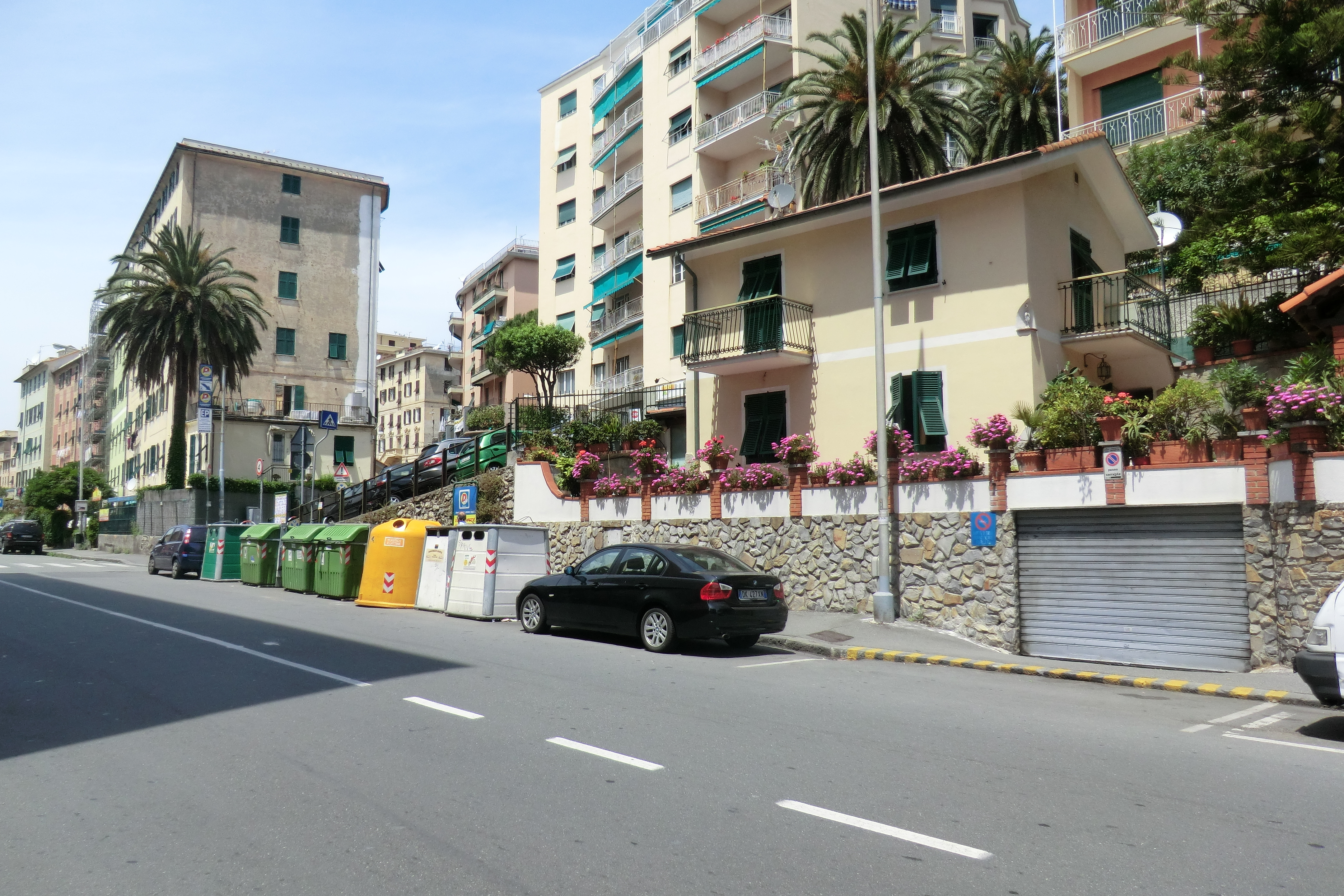 Casello Genova Quinto